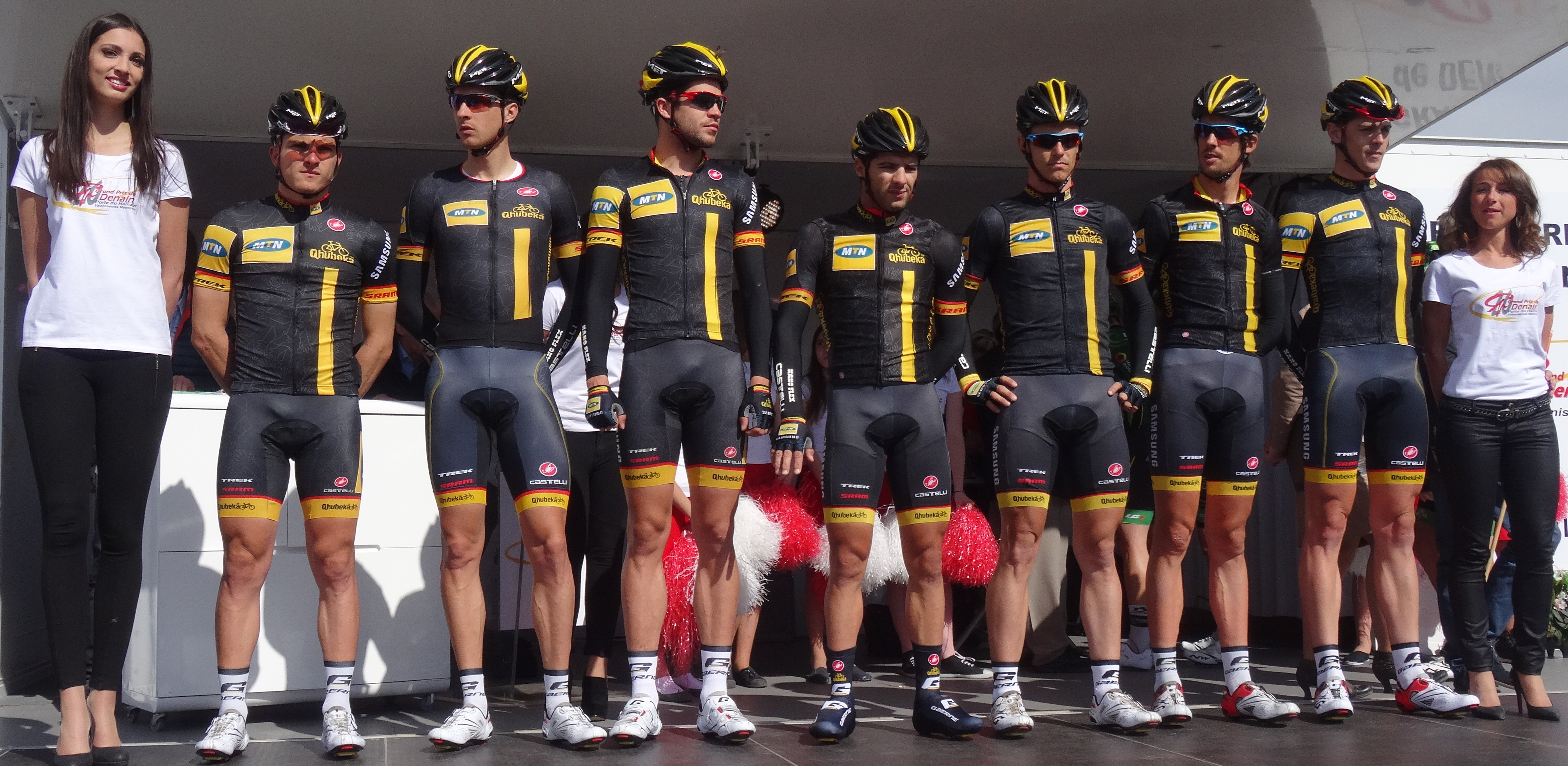 Reportage réalisé le jeudi 17 avril à l'occasion du départ et de l'arrivée du Grand Prix de Denain 2014 à Denain, Nord, Nord-Pas-de-Calais, France.